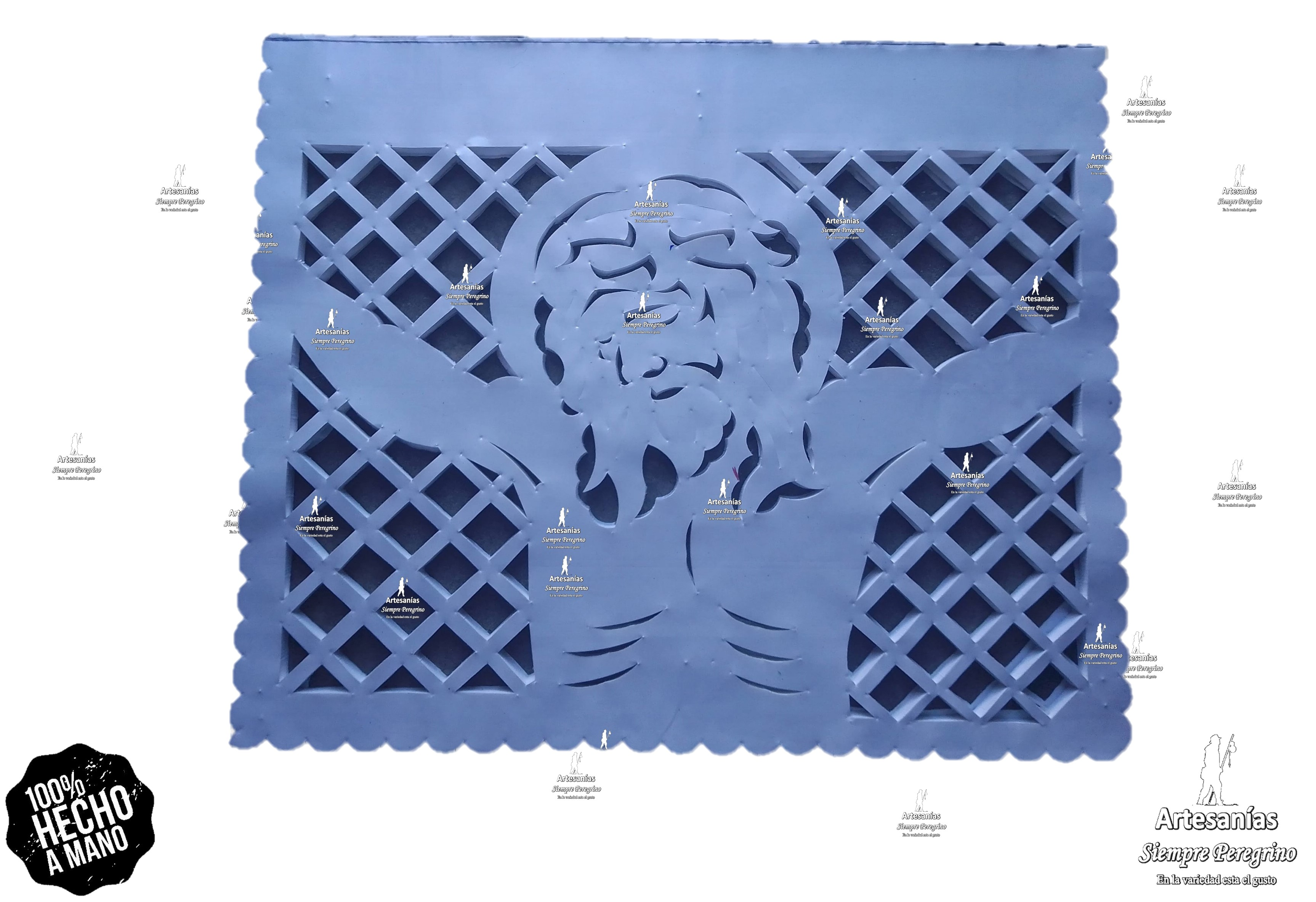 Decoracion de Papel Picado de Semana Santa cristo en la cruz